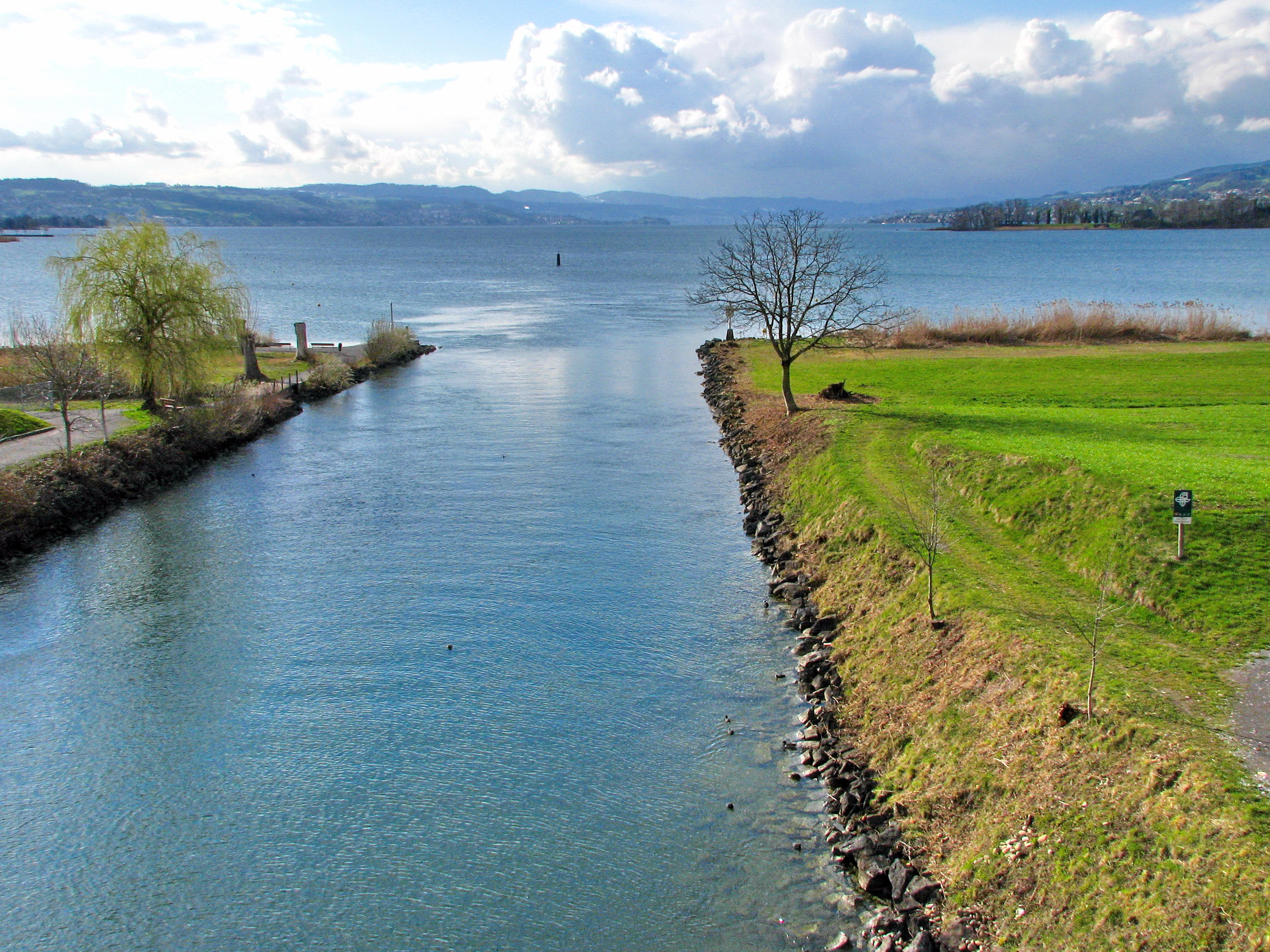 Canal in Hurden Frauenwinkel protected area (Switzerland) between Zürichsee (Lake Zürich) and Obersee (upper Lake Zürich) as seen from Kanalweg, Zimmerberg (to the left), Ufenau island and Pfannenstiel in the background.